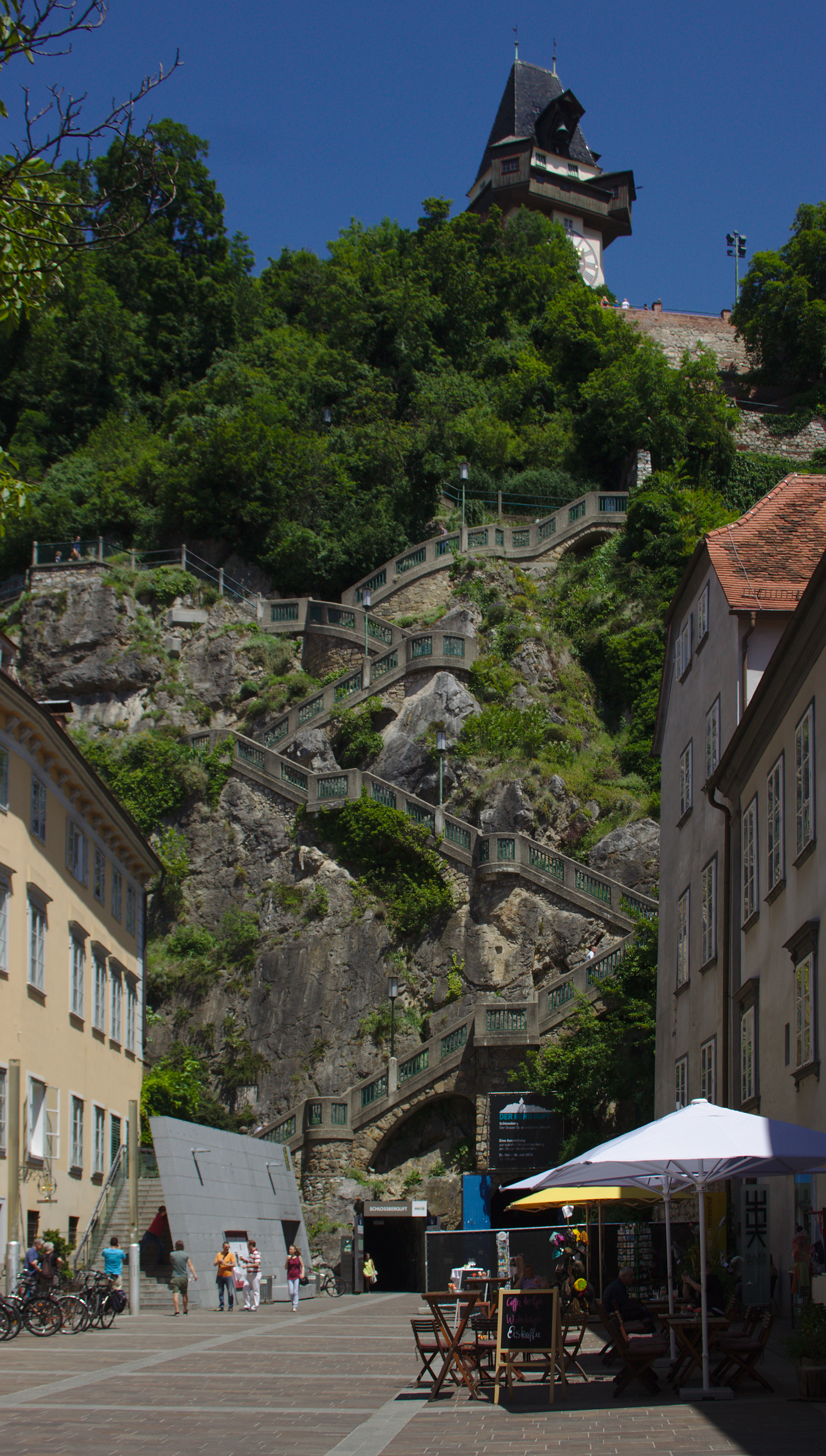 Stiegenanlage, Kriegssteig